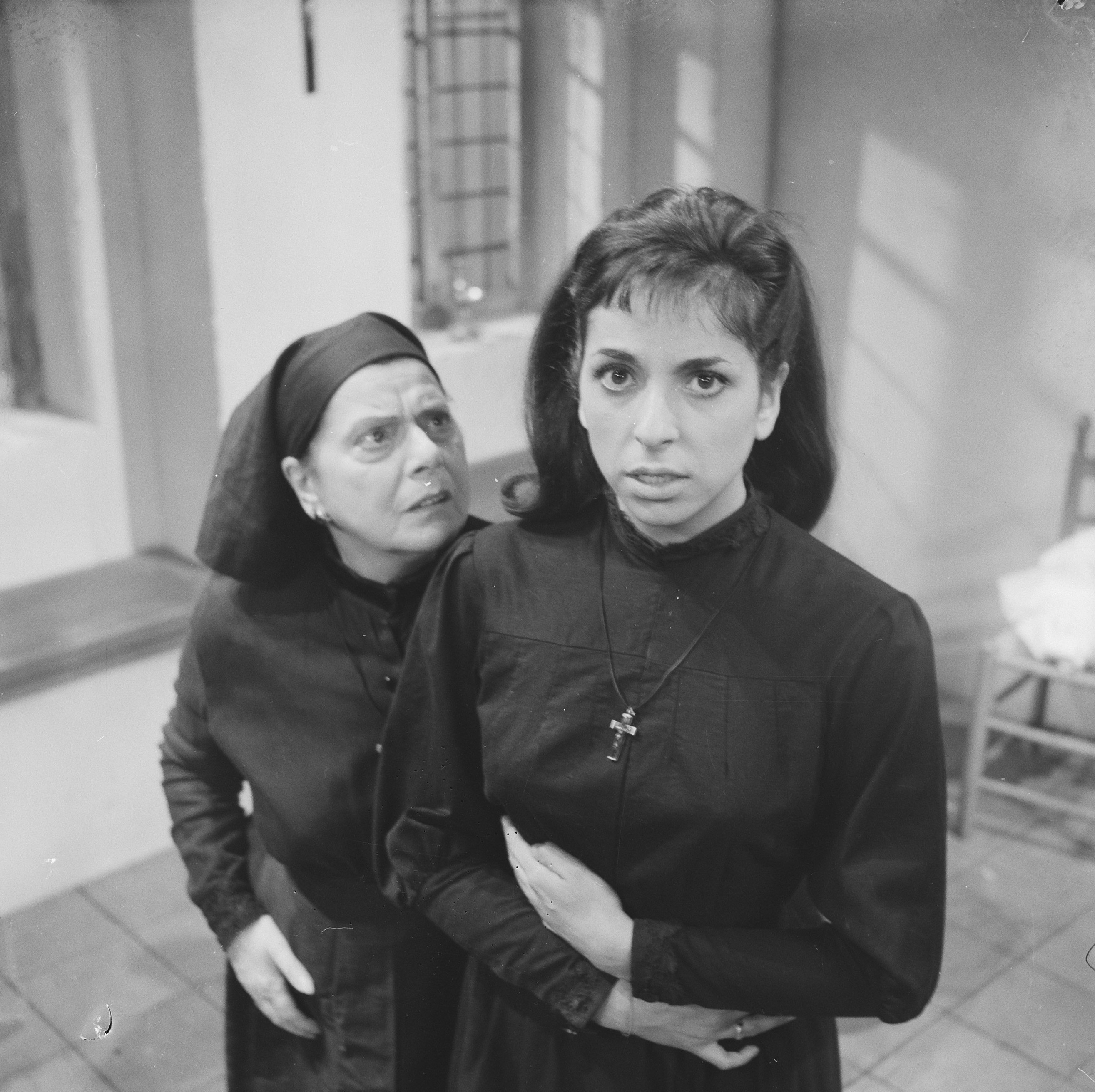 Collectie / Archief : Fotocollectie Anefo Reportage / Serie : [ onbekend ] Beschrijving : AVRO brengt TV-spel "Het huis van Bernarda Alba". Scene Marie Hamel en Shireen Strooker (rechts) Datum : 6 februari 1963 Trefwoorden : acteurs, televisiedrama's Persoonsnaam : Hamel, Marie, Strooker, Shireen Fotograaf : Nijs, Jac. de / Anefo, [onbekend] Auteursrechthebbende : Nationaal Archief Materiaalsoort : Negatief (zwart/wit) Nummer archiefinventaris : bekijk toegang 2.24.01.03 Bestanddeelnummer : 914-7926